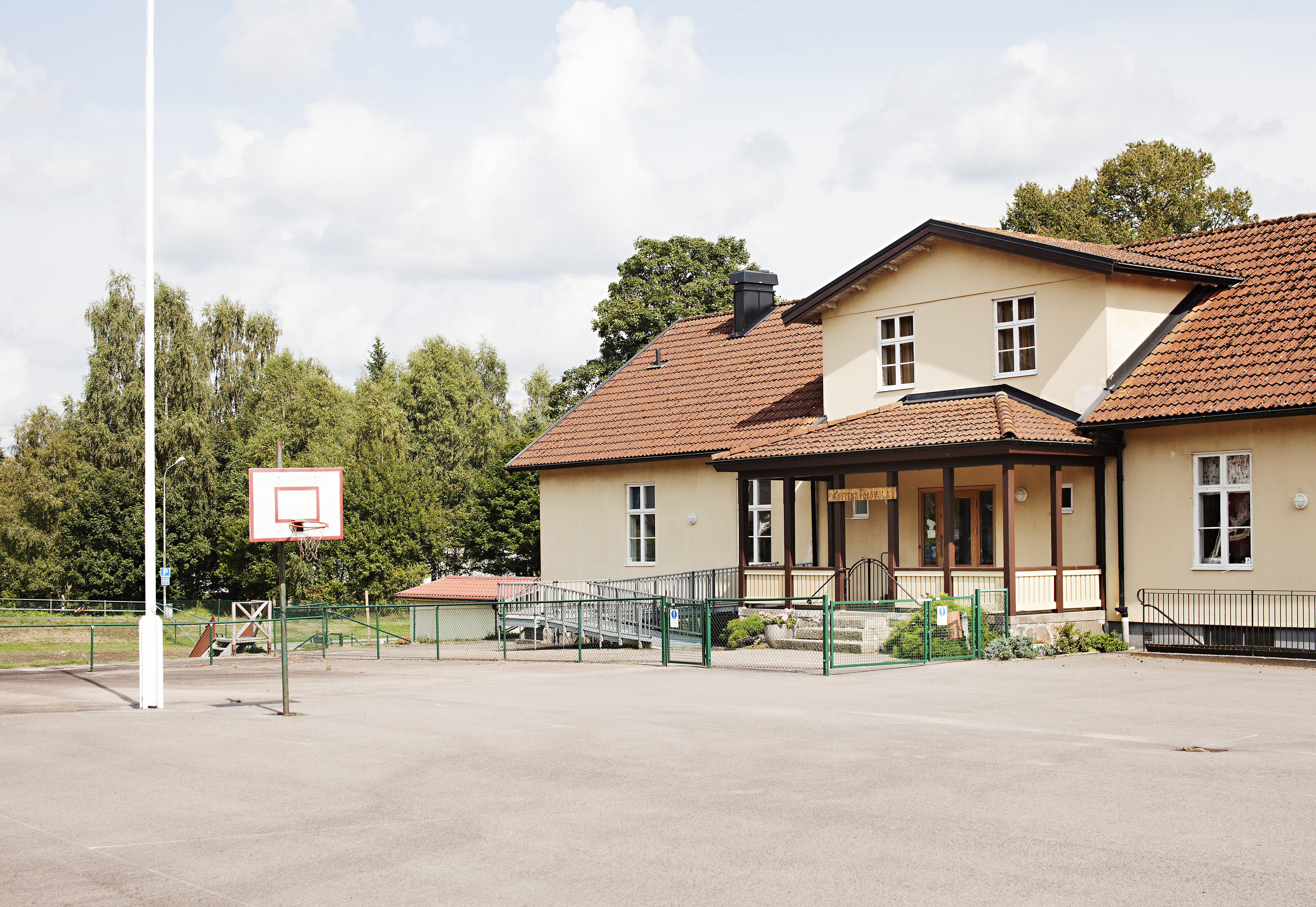 Skolgård i Eket.